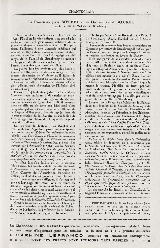 Chanteclair . - 1923. - 18e année Pour établir des liens vers ce document, utiliser les URL ci-dessous : Livre : Page